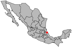 Location of Poza Rica de Hidalgo, Veracruz